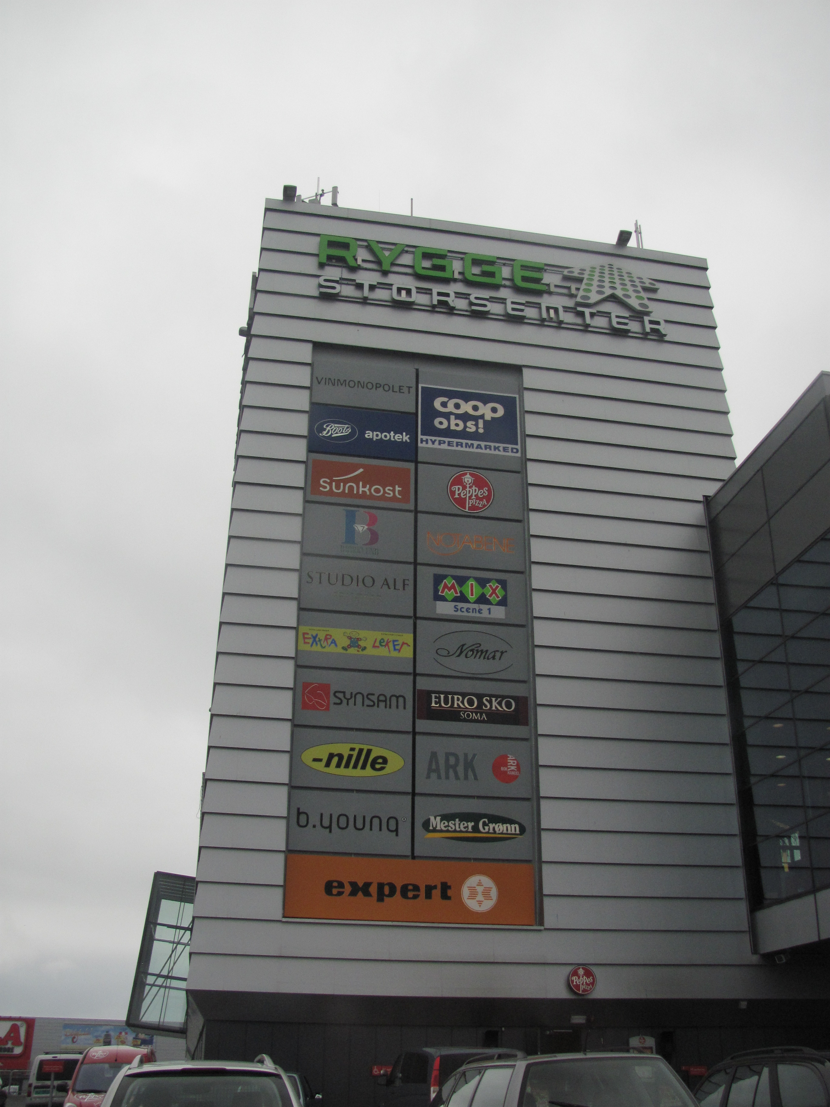 Rygge Storsenter